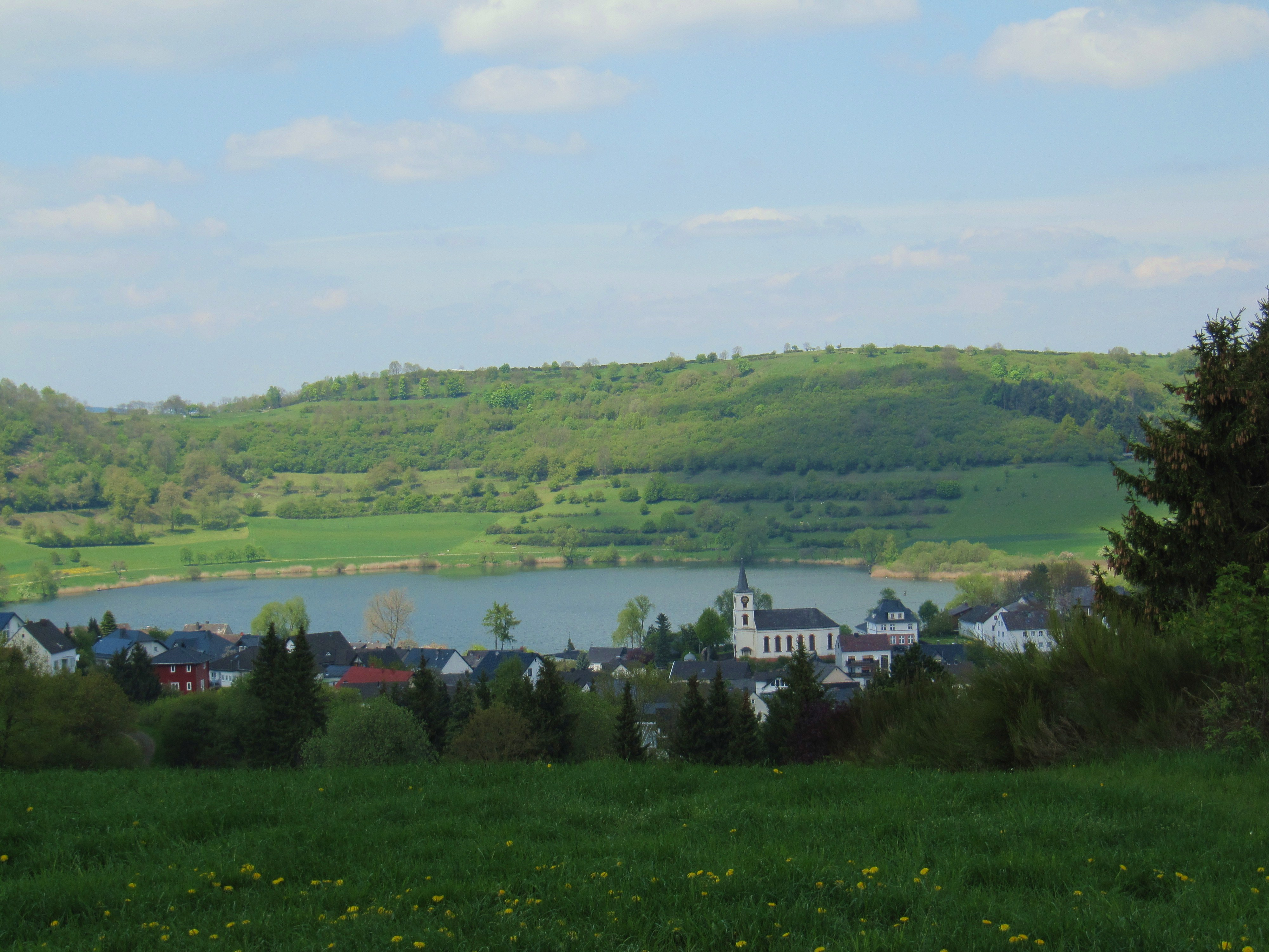 Imagen del lago en Schalkenmehren